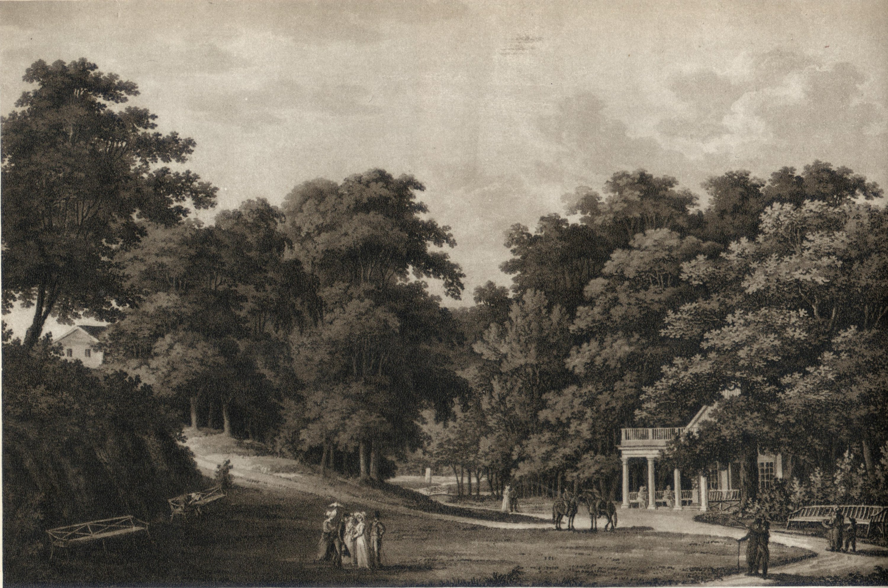 Ramlösa brunn. Akvatintetsning av C.F. Akrell 1823 efter en teckning av W.M. Carpelan 1816.